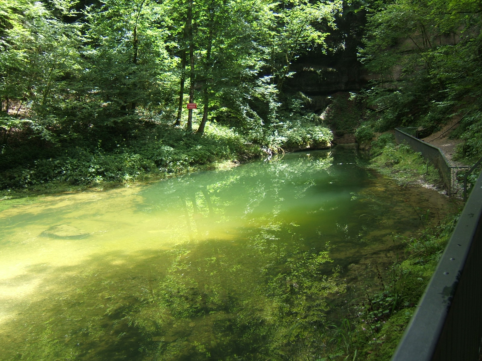 Source de l'Ain (Jura, France)